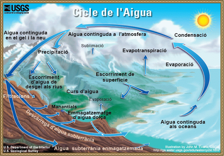 Traducció al català de la imatge original en anglès, Cicle aigua.gif